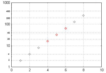 exemple de repère semi-logarithmique. Image personnelle créée avec gnuplot et gimp. Domaine public.